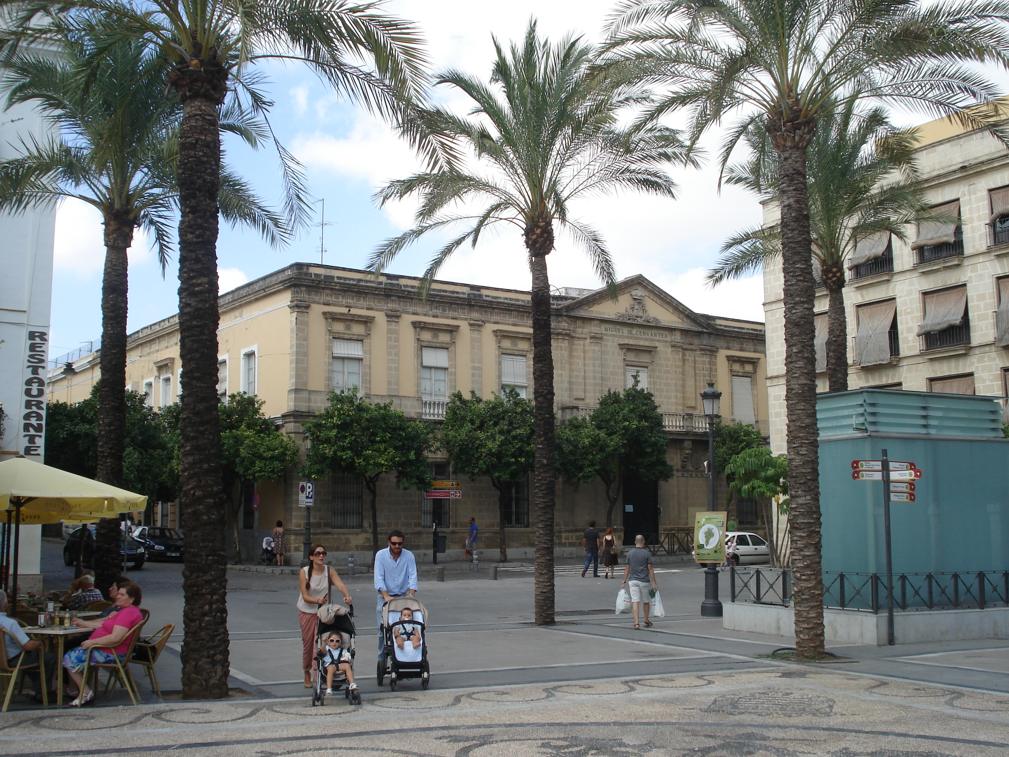 Antiguos Juzgados donse se juzgo a los condenados de la Mano Negra